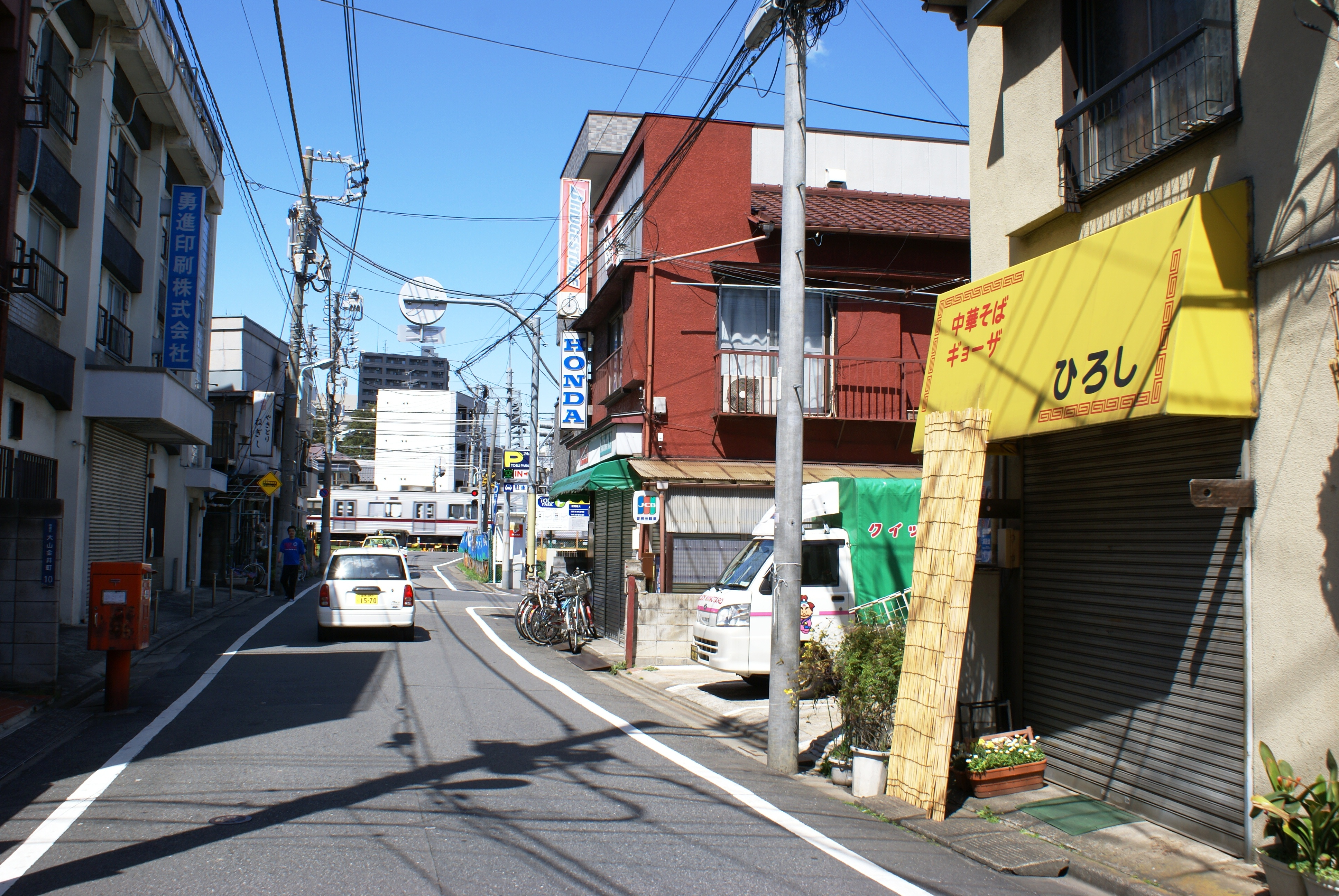 金井窪村の高田道